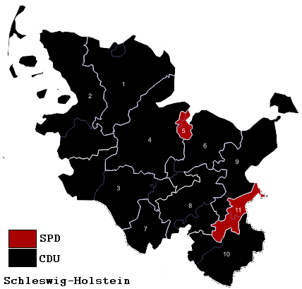 Districts de Schleswig-Holstein en 2009.